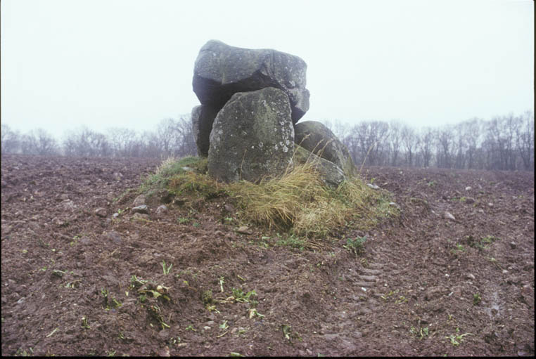 Fjärestad 2:1. Dös i hög. På takblockets ovansida finns älvkvarnar Fjärestad 2:2. Motiv: Fjärestad 2:1 Kategori: Stenkammargrav Fjärestad 2:1. Dös i hög. På takblockets ovansida finns älvkvarnar Fjärestad 2:2. Fjärestad 2:1.